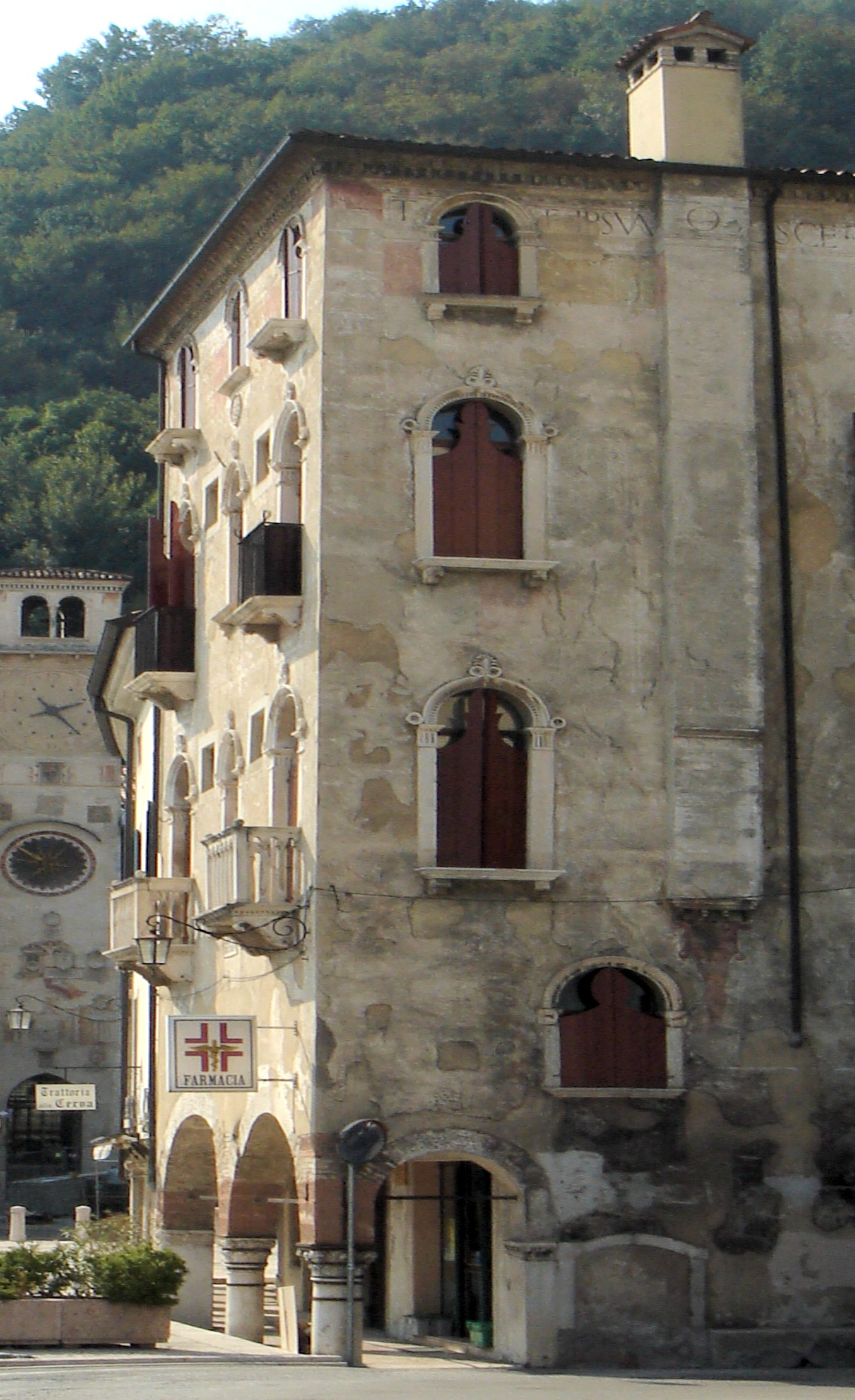 Serravalle di Vittorio Veneto (Treviso): Palazzo Cesana di piazza Flaminio.